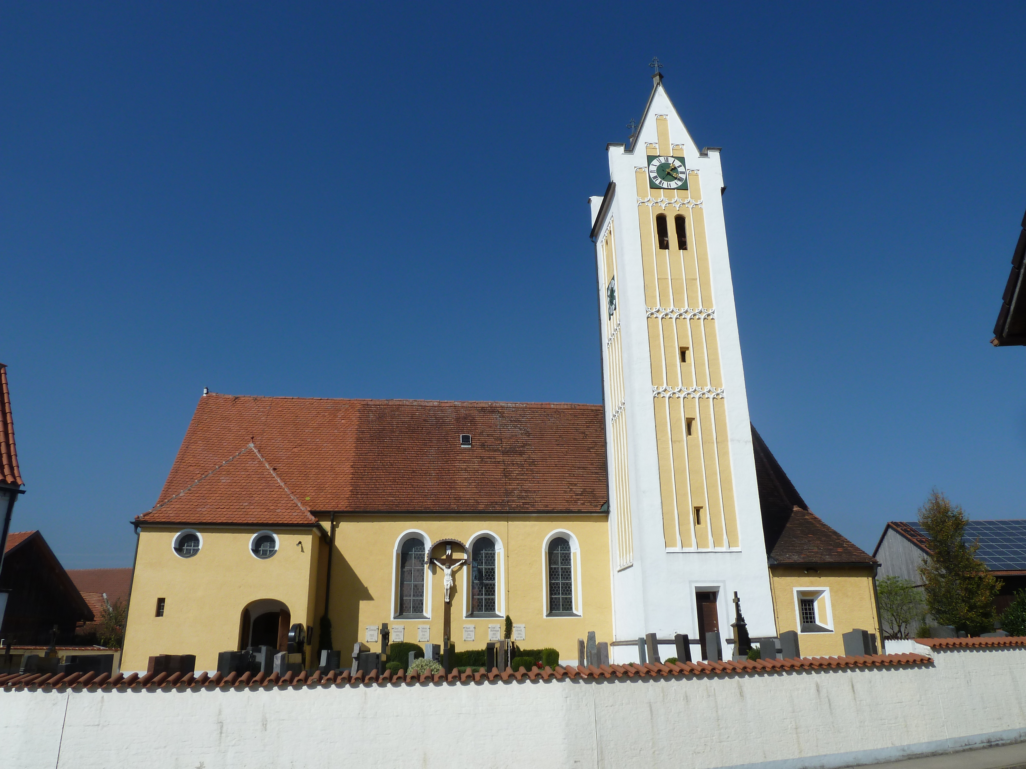 Rieden Pfarrkirche St Martin von Tours Süden